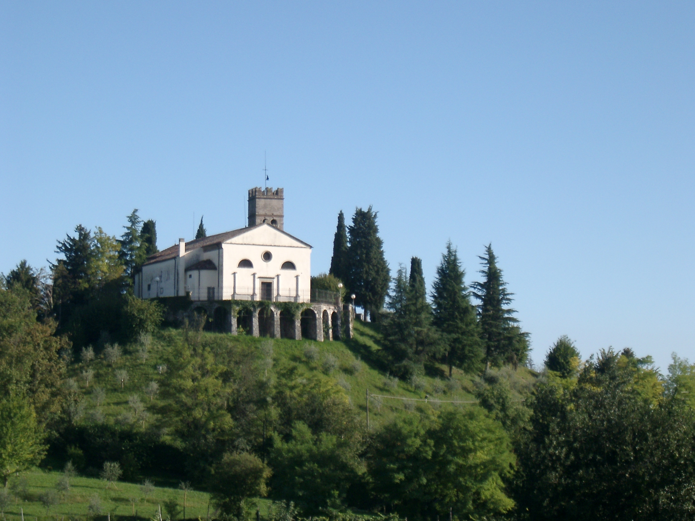 veduta della chiesa monumentale di Castello Roganzuolo